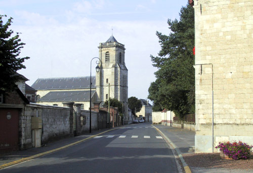 l'église de rivière